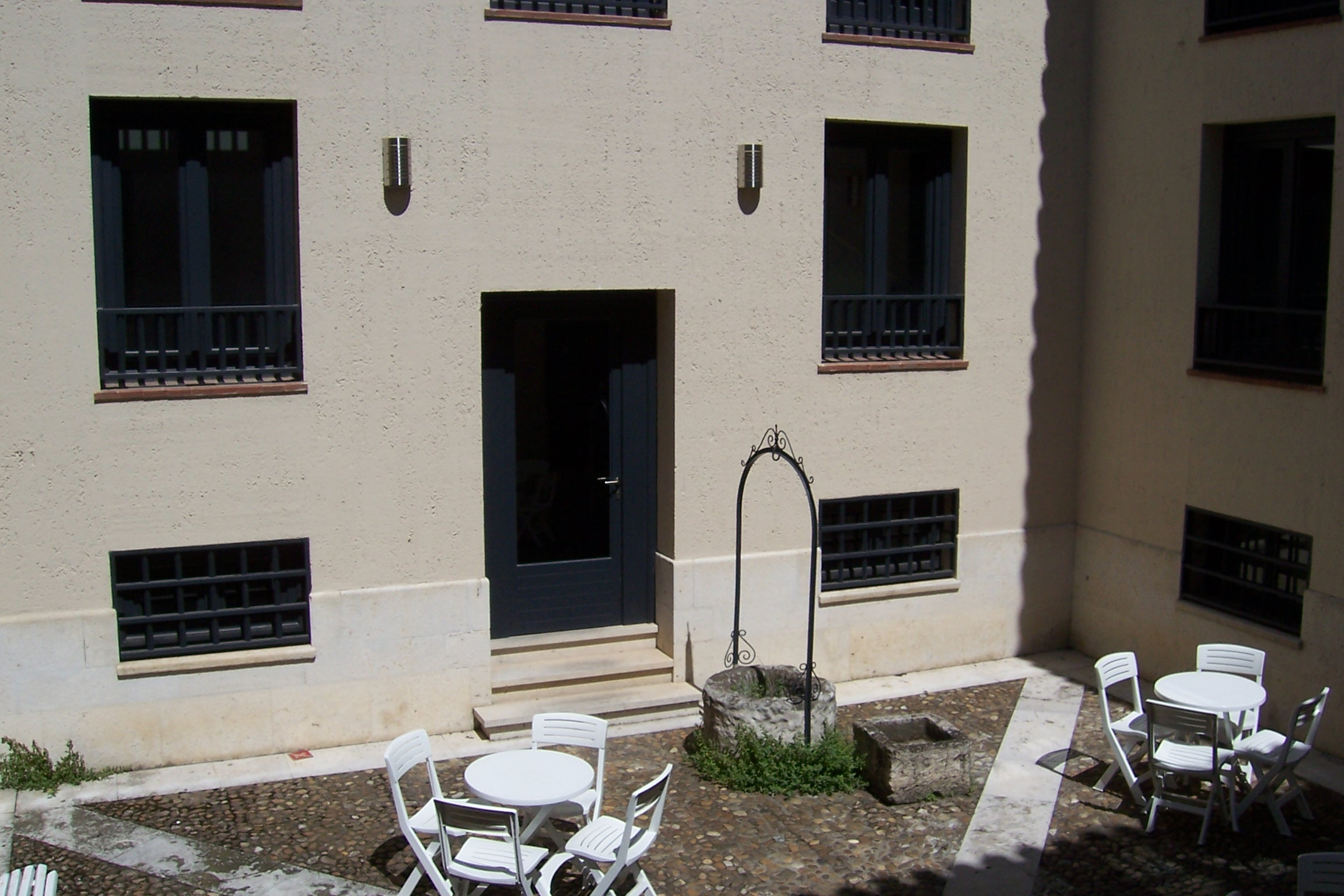 Casa Revilla en la calle de Torrecilla, Valladolid, España.